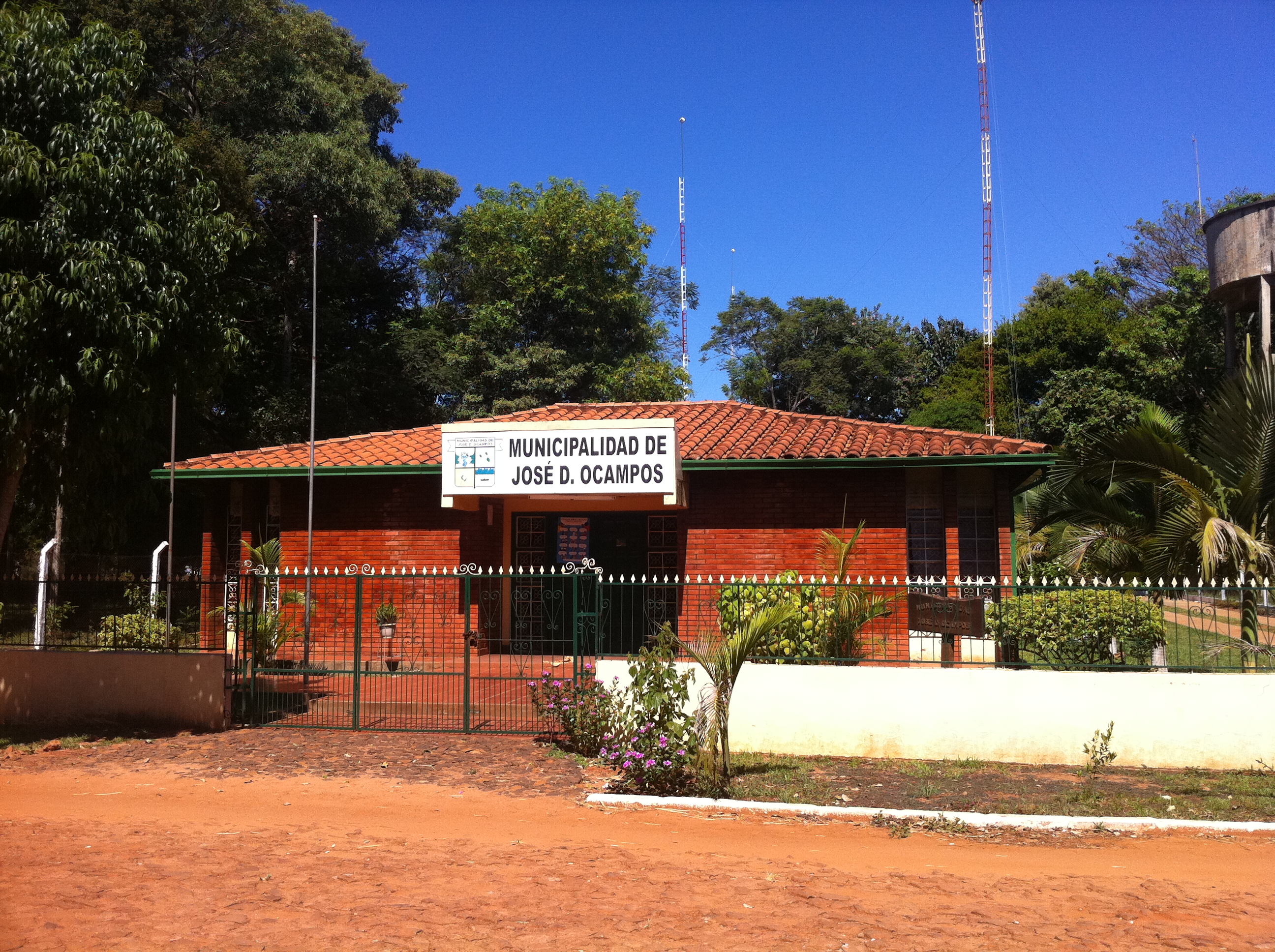 Municipalidad de José Domingos Ocampos